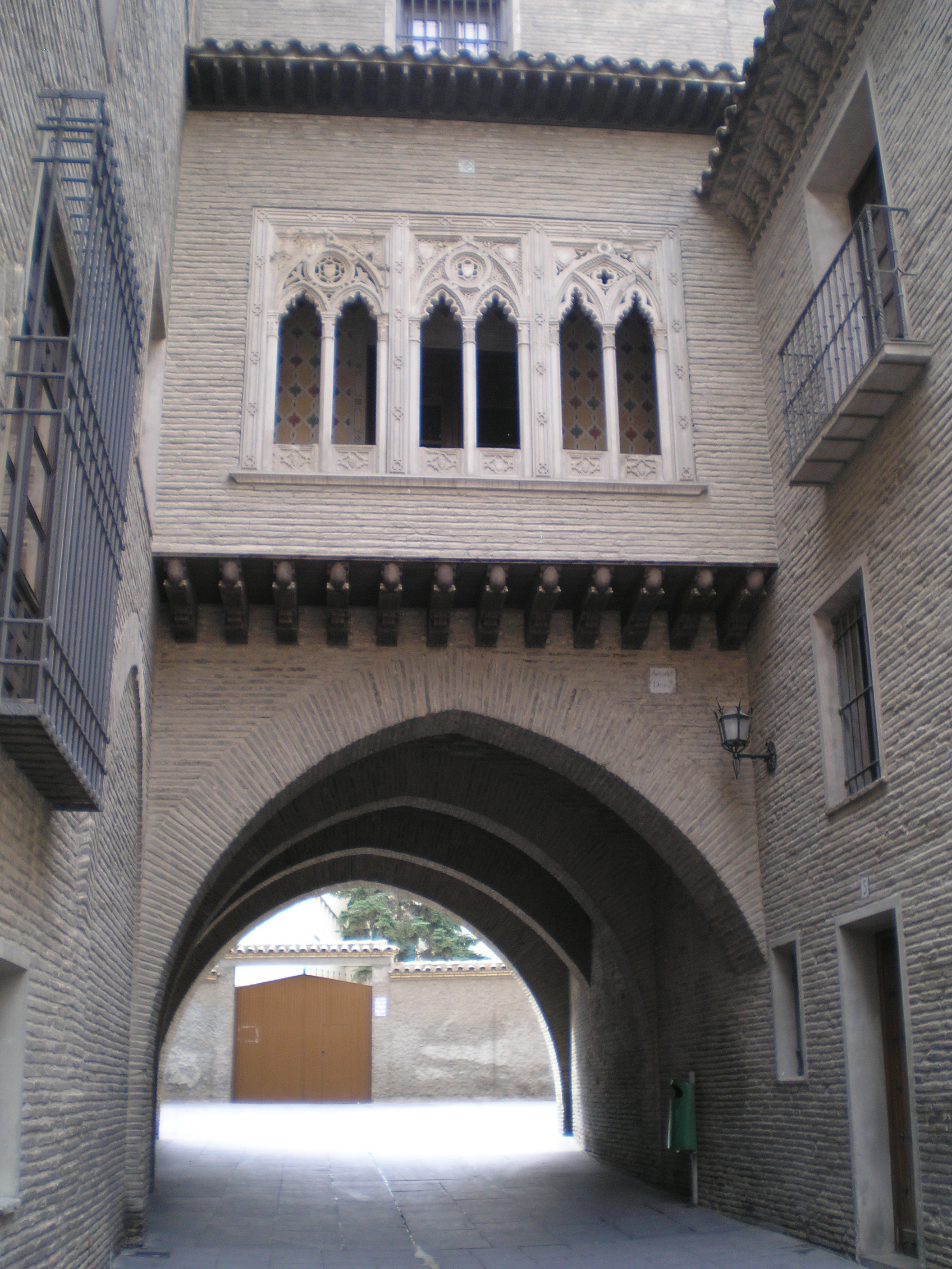 Arco del Deán, Zaragoza.